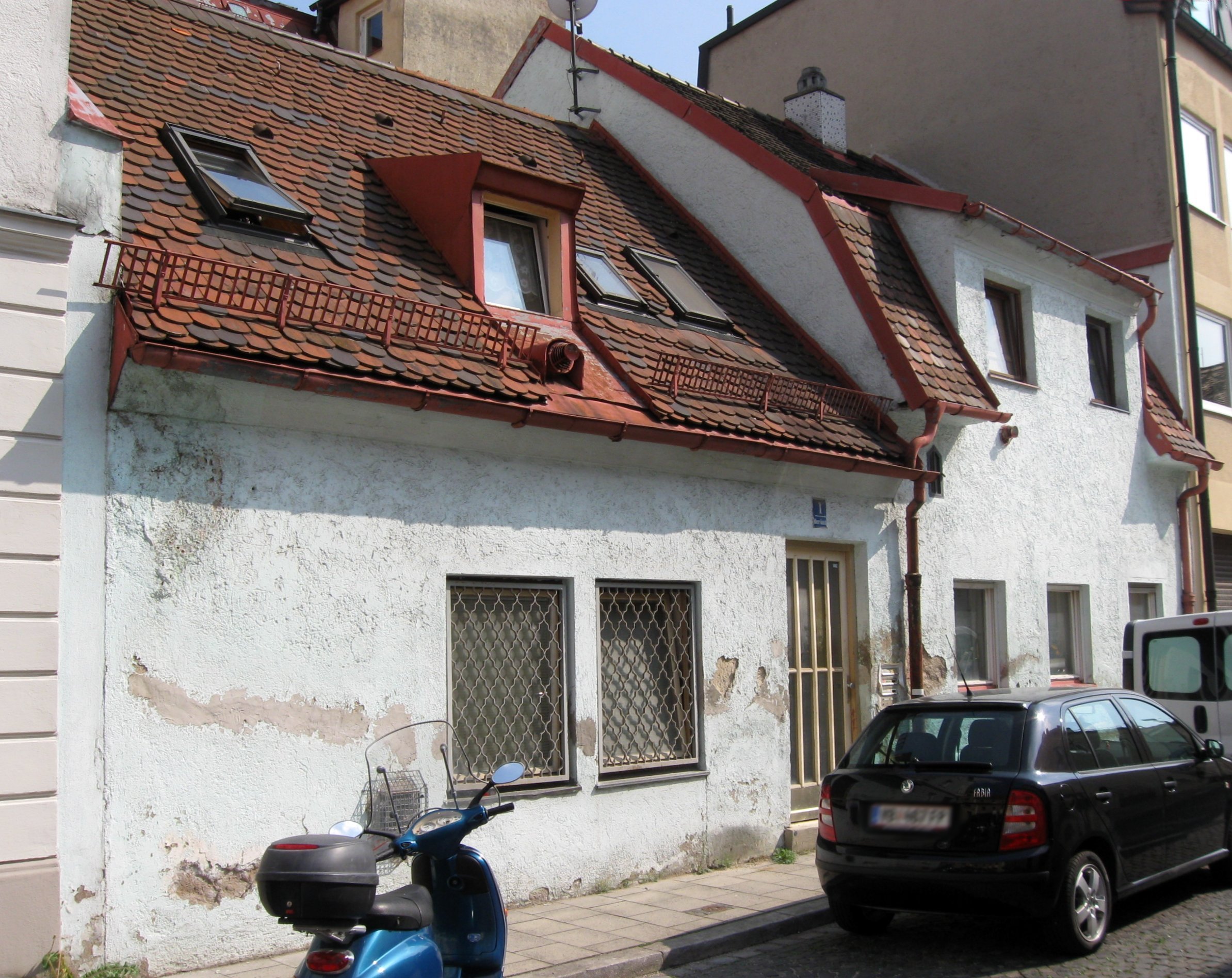 Obere Grasstraße 1; Erdgeschossiges Satteldachhaus, im Kern um 1840/45. Das Gebäude wurde am 31 August, bzw. am 1. September 2017 abgerissen. (Pressemeldungen, BR 04.09.2017, SZ 04.09.2017, AZ 04.09.2017).